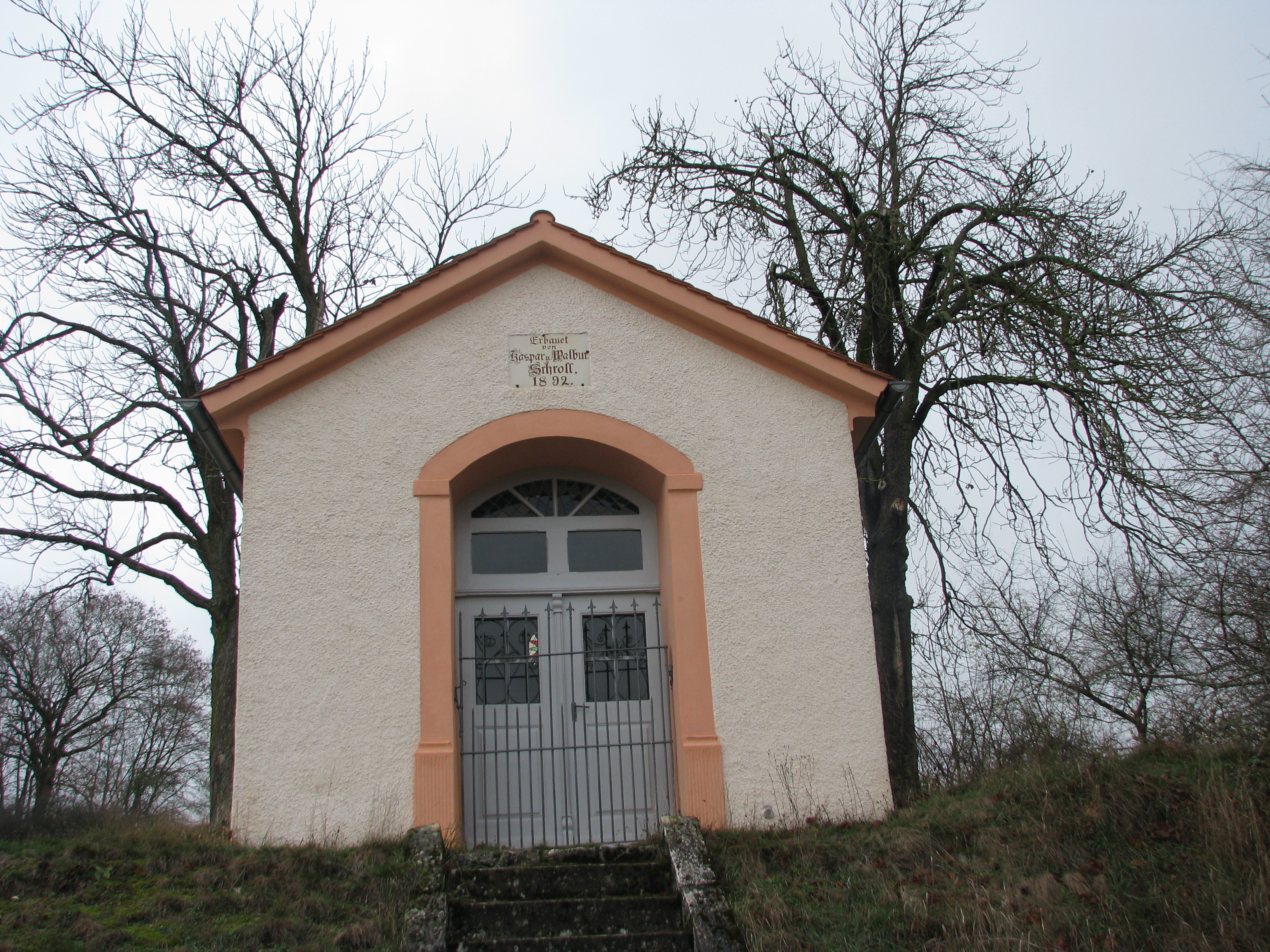 Kraftsbuch, Ortsteil von Greding im mittelfränkischen Landkreis Roth in Bayern